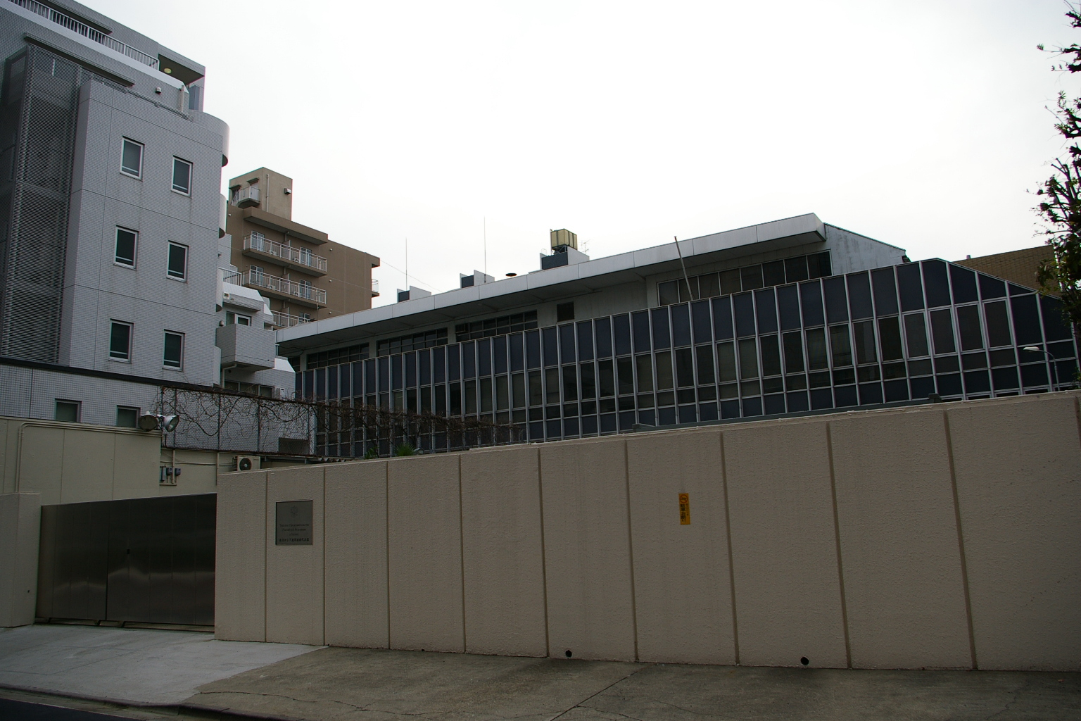 Ich machte dieses Foto von mir in 2006. 駐日ロシア連邦通商代表部